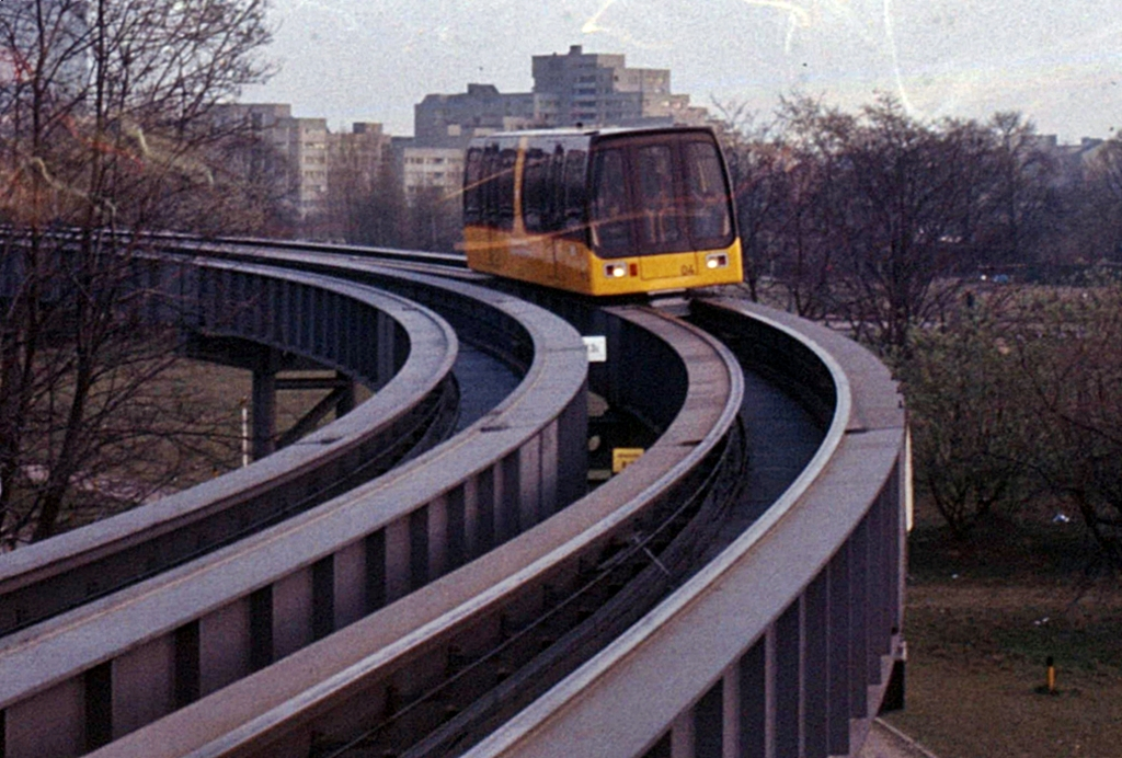 M-Bahn Berlin April 1990